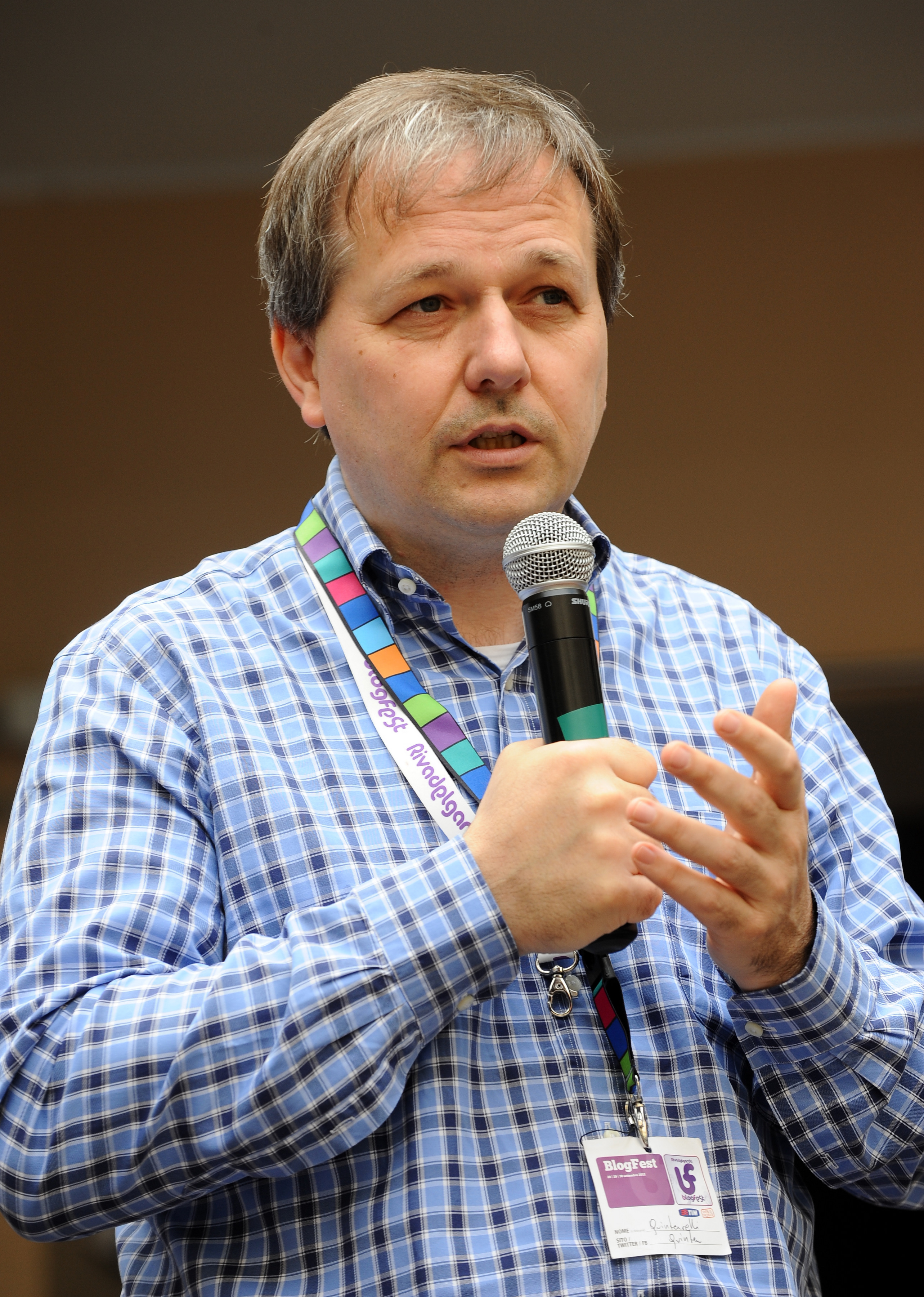 Stefano Quintarelli al Blogfest 2012 a Riva del Garda.